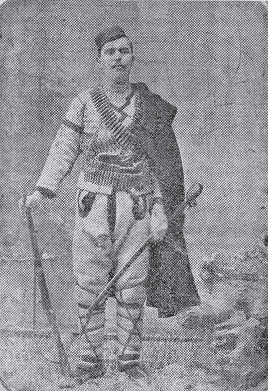 Марко Иванов.